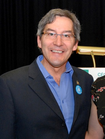 Scott McKay lors de son passage au Cégep de Chicoutimi.